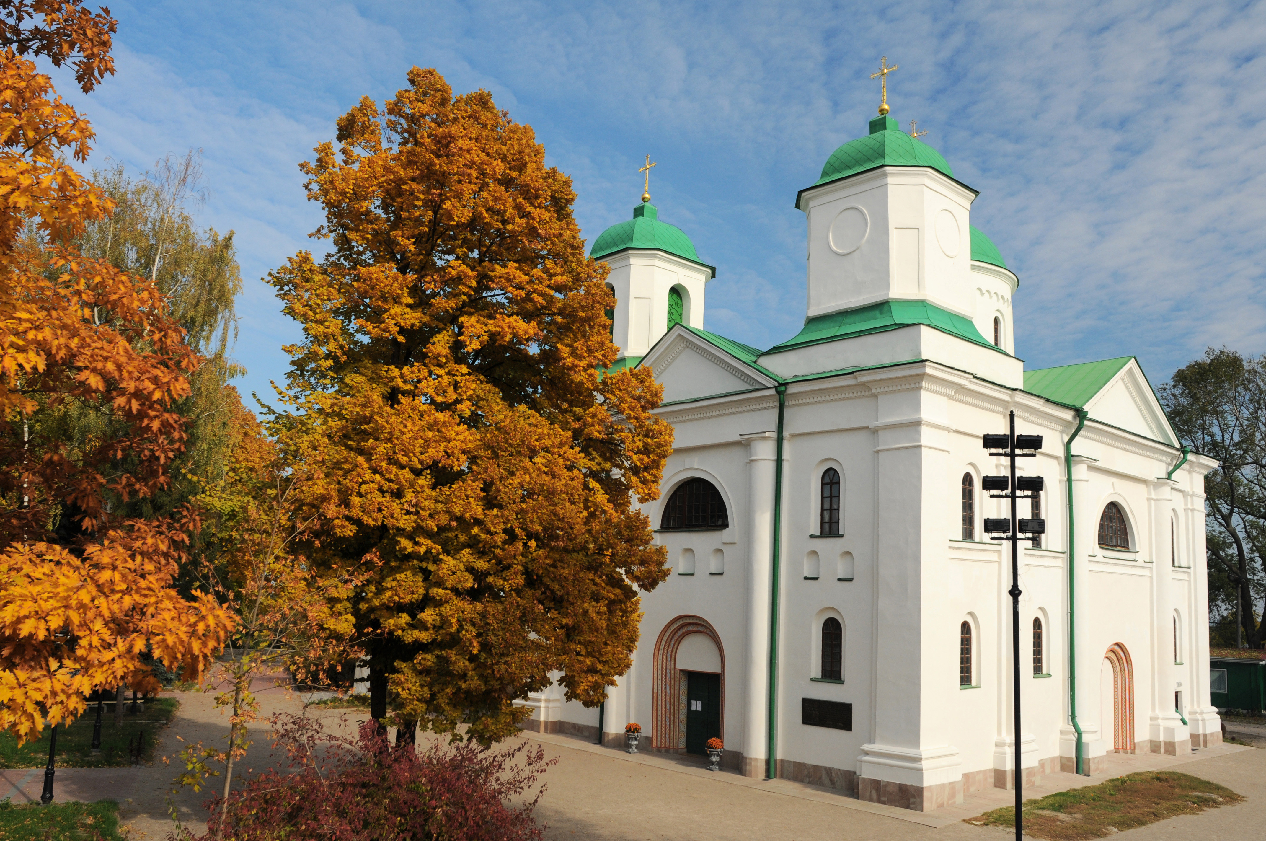 Канів, Георгіївський собор